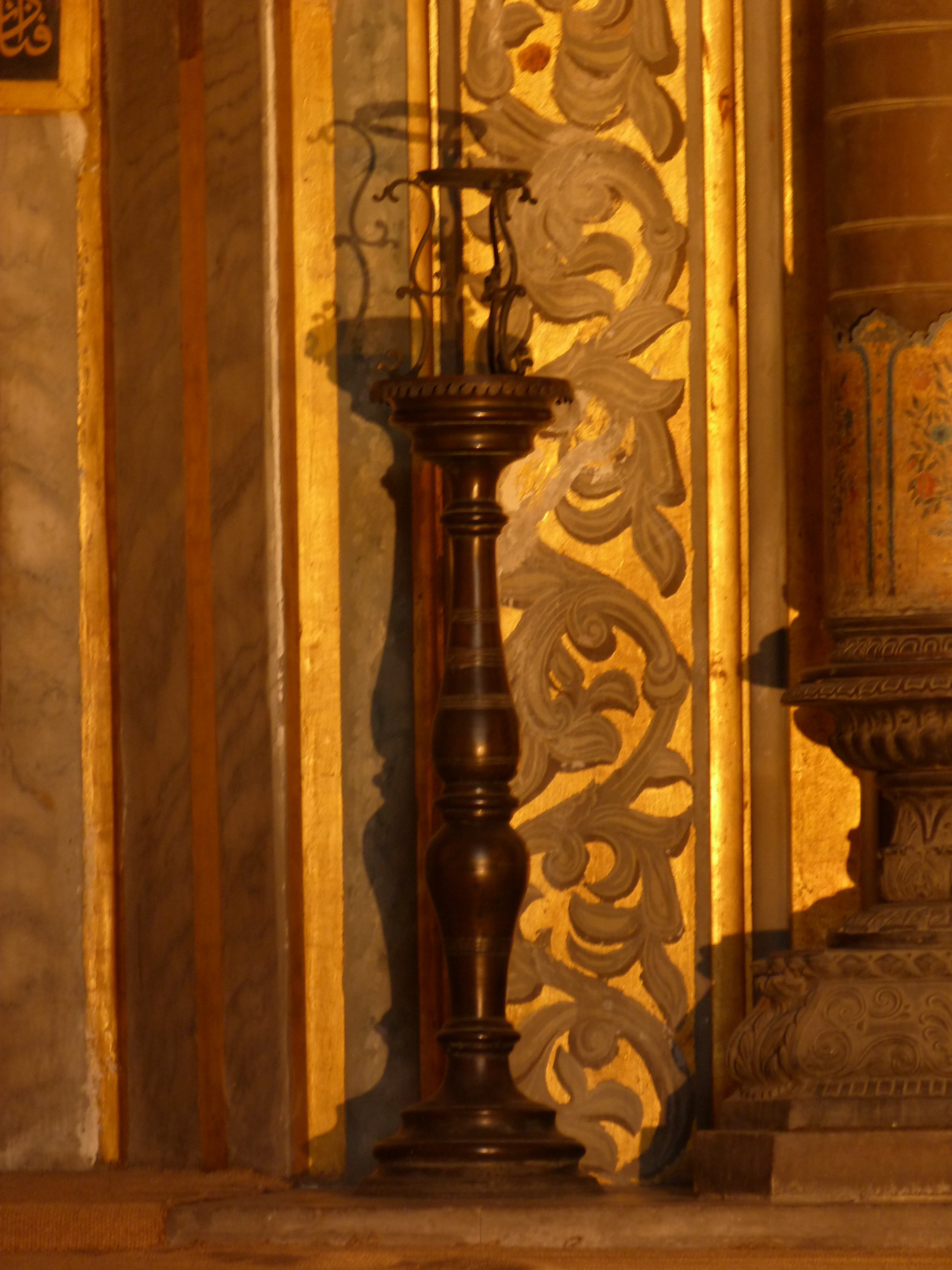 A felvétel 2014. október 23-án csütörtökön készült. Törökország, Isztambul. Hagia Szophia. Az Isteni Bölcsesség temploma. Az 563 december 24-én felszentelt keresztény templom mintegy ezer évig a Konstantinápolyi Patriarchátus székhelye, a Bizánci Birodalom szellemi központja. Konstantinápoly török meghódítása után fődzsámi, majd 1935-től napjainkig múzeum. Trónoló Istenanya a gyermek Jézussal, Nagy Konstantin és Justiniánus. Az apszisbeli imafülke két oldalán gyertyatartók, II. Szulejmán Buda első elfoglalásakor szerzett hadizsákmánya. ©© Derzsi Elekes Andor, Budapest, 2014, A kép egészben, vagy részletekben másolását, bármilyen úton történő sokszorosítását és felhasználását a szerző ellenérték nélkül, jogutódjaira is kihatóan megengedi. Az engedély kiterjed a kereskedelmi célú hasznosításra is. Kéri azonban nevének feltüntetését a felhasználás során. A Metapolisz sorozat valamennyi képe és filmje Creative Commons alatti valamint kereskedelmi - for profit - célra is felhasználható. Ajánlott hivatkozás: Derzsi Elekes Andor: Metapolisz DVD line